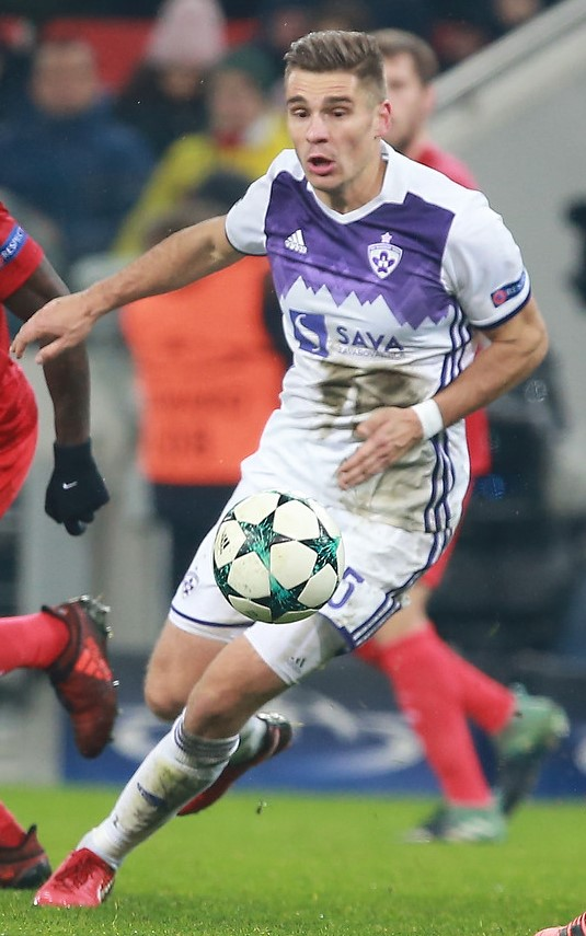 Blaž Vrhovec